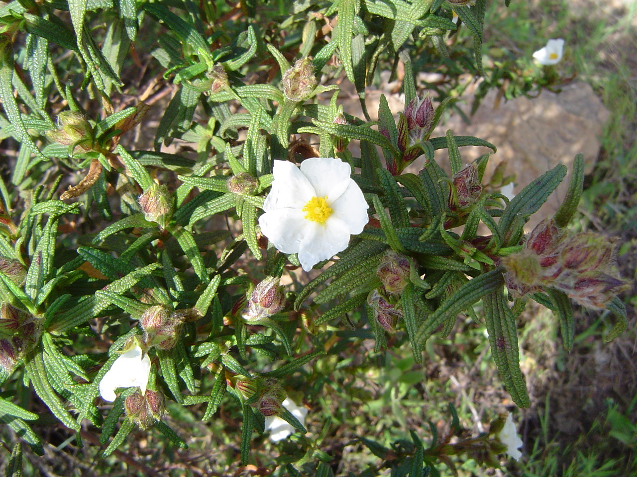 Cistus monspeliensis, Ceuta, España